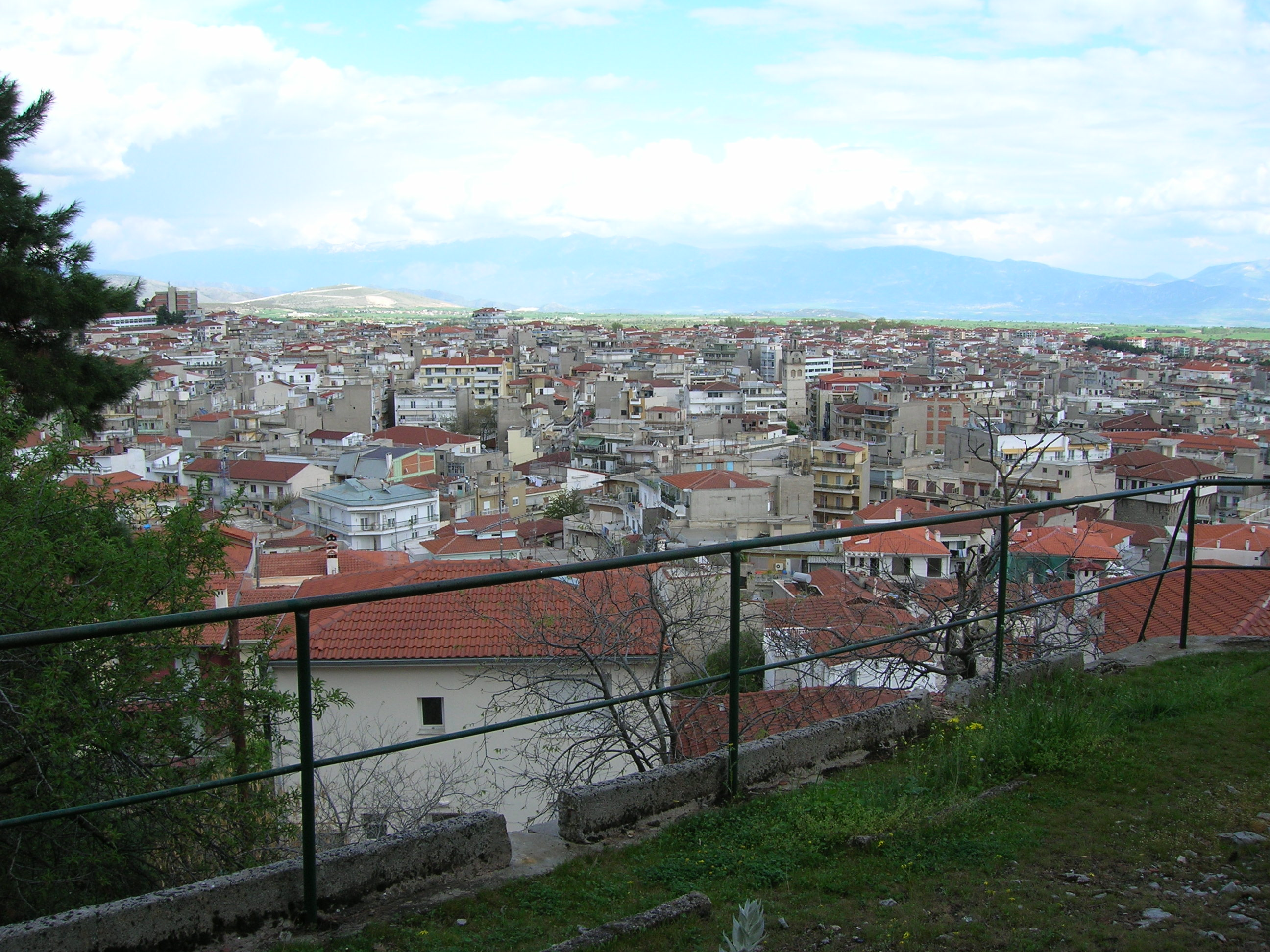 Pogled na središte Kozanija glavni grad periferije.